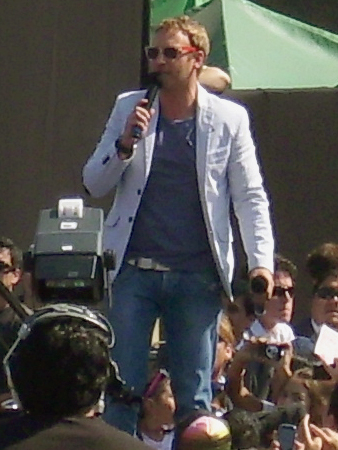 El animador de televisión Martín Cárcamo (Bienvenidos de Canal 13) durante el lanzamiento del ábum Perla, mi gitano corazón en la Plaza de Armas de Maipú. Santiago de Chile, 9 de febrero de 2012.